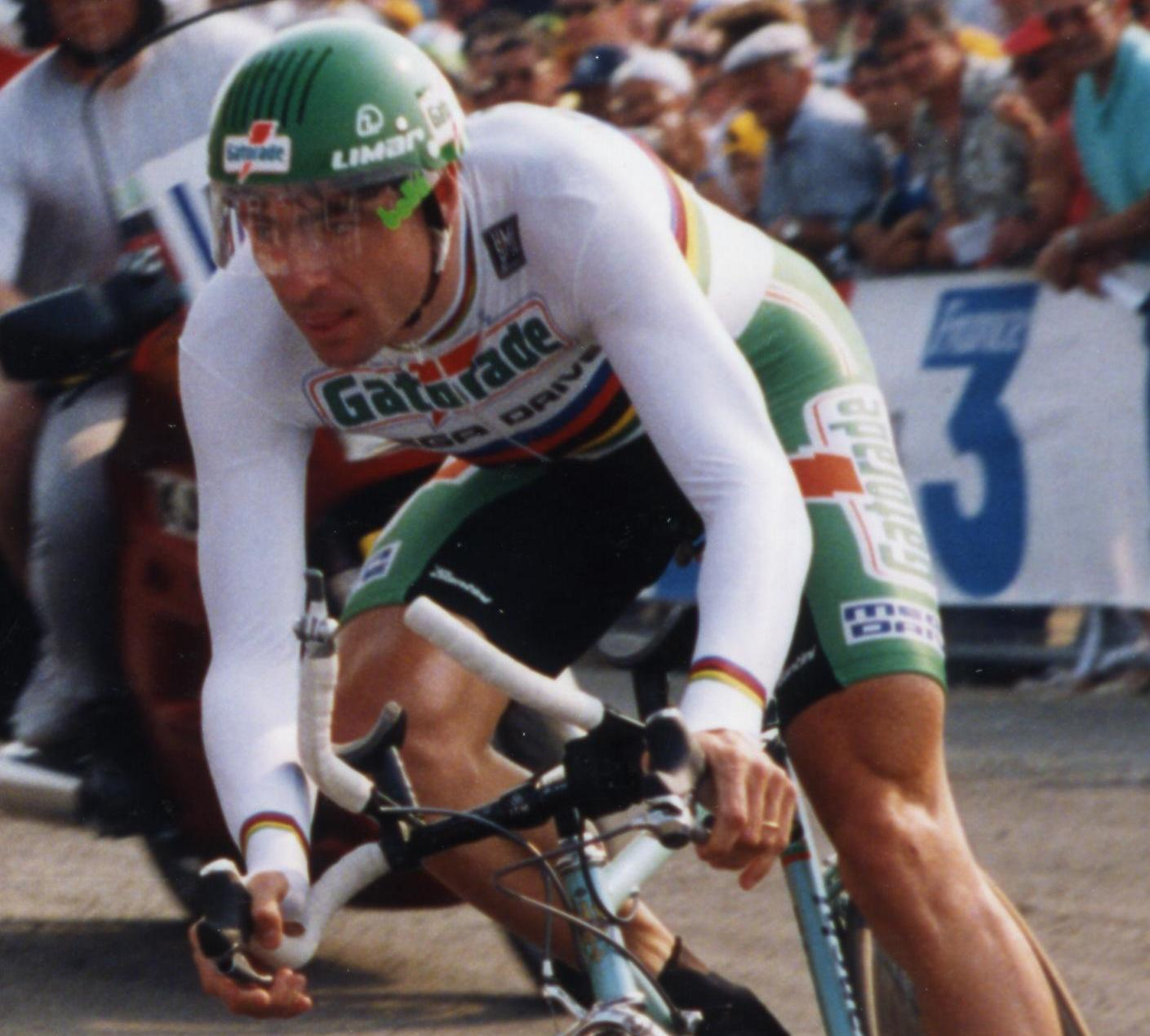 TOUR DE FRANCE 1993